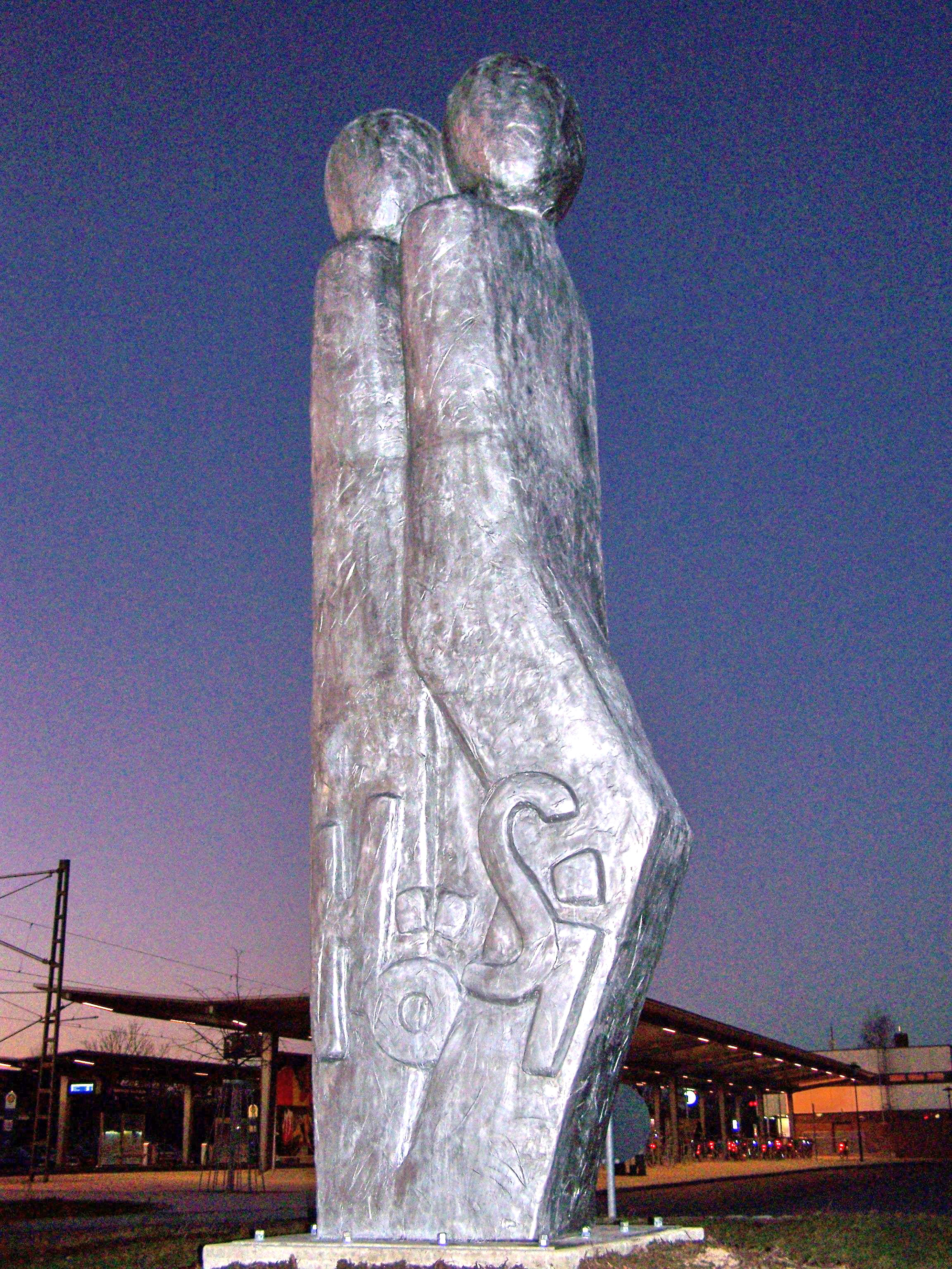 Skulptur "HöSi" in Höhenkirchen-Siegertsbrunn, germany"